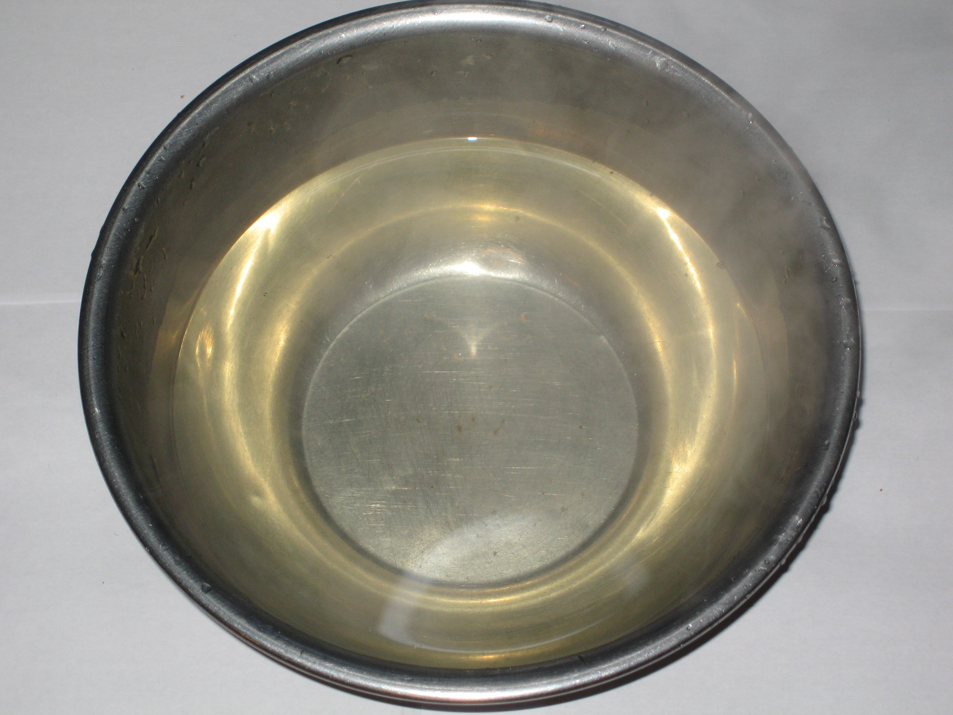 日本のだし汁